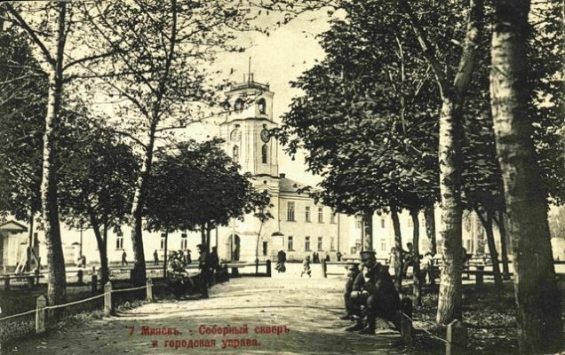 Городская управа